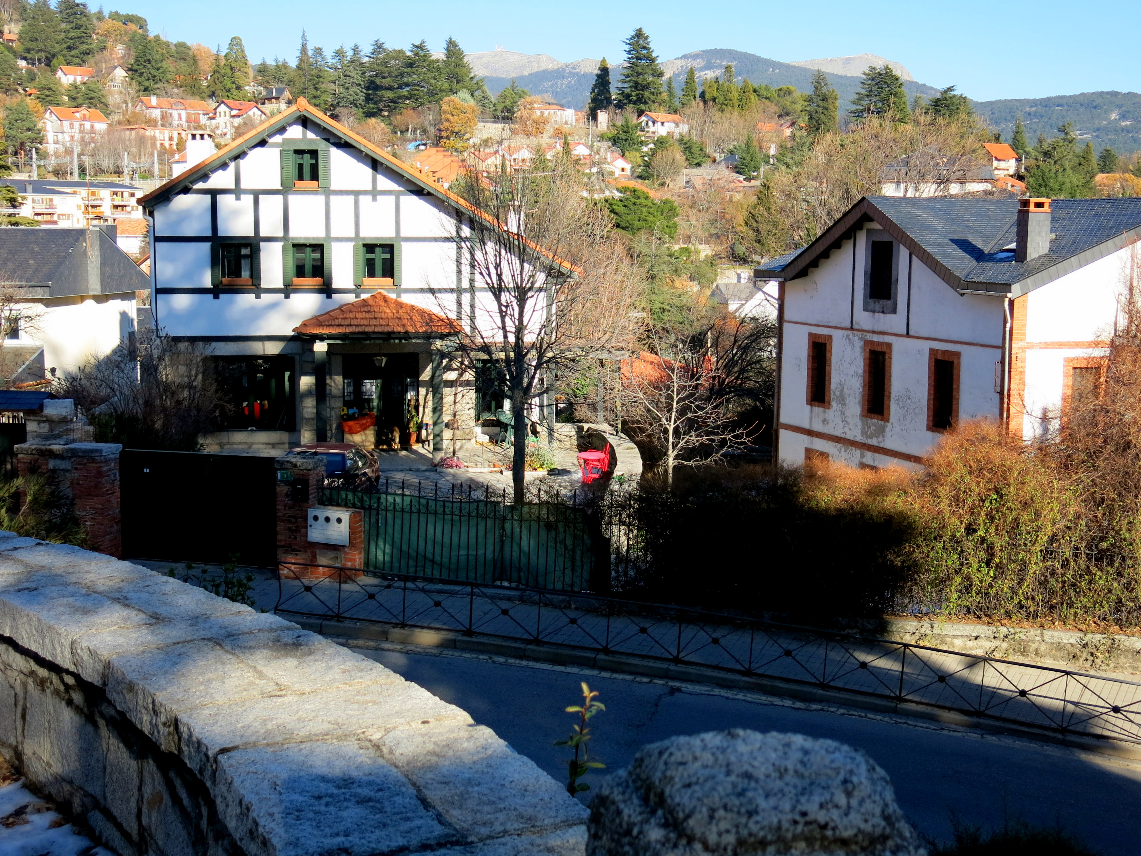 Cercedilla y las primeras nieves de este otoño